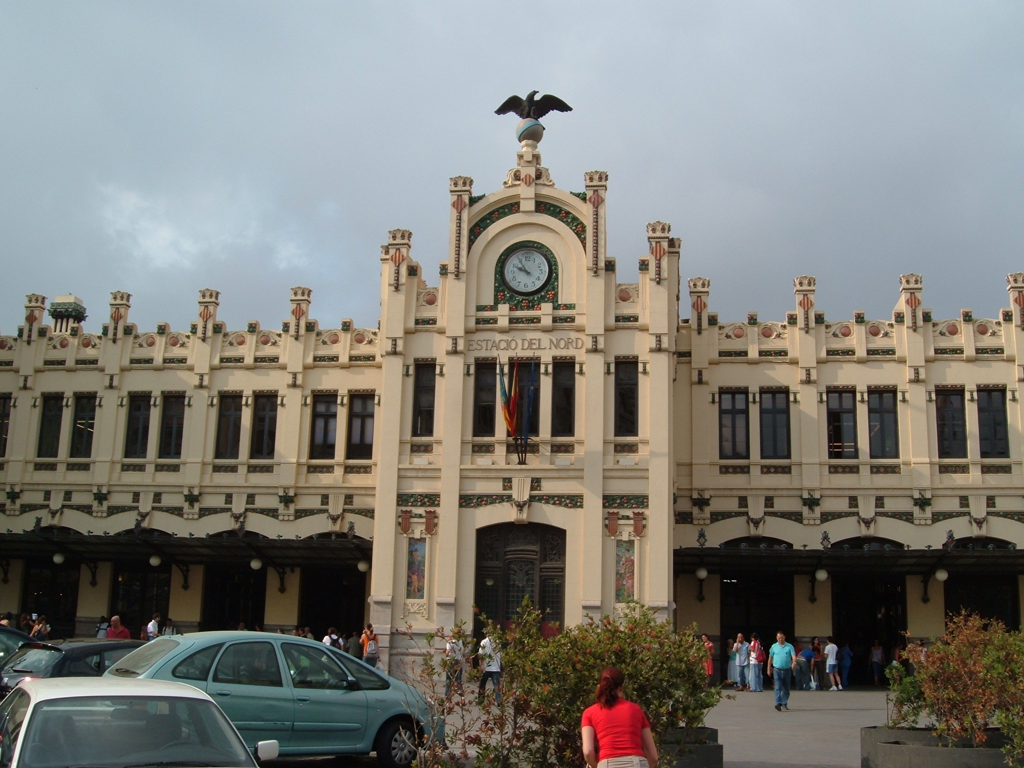 Estació del Nord, València